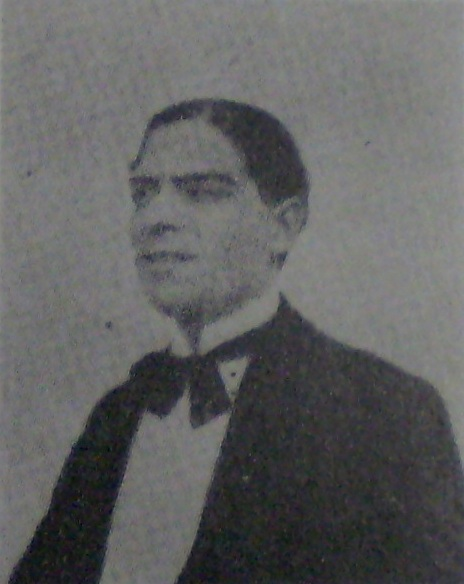 Eduardo Arolas